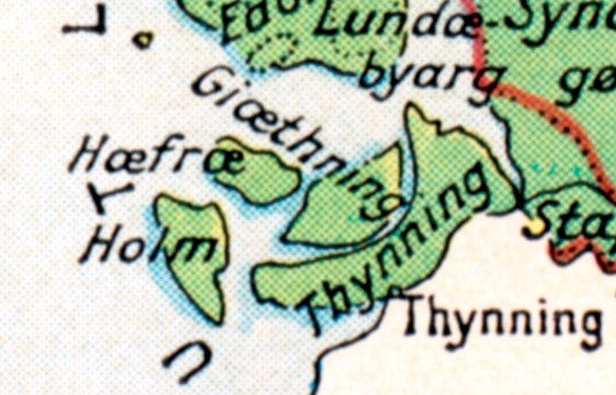 Ejdersted i 1200-tallet, på grundlag af Johannes Steenstrup herred-kort i Danmarks Riges Historie.